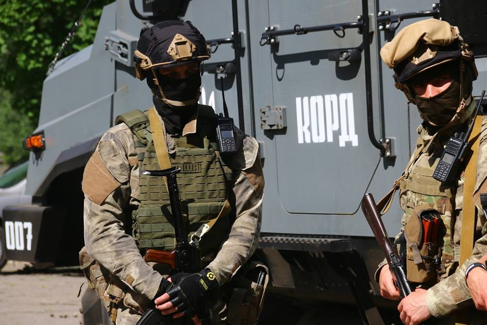 КОРД охороняє порядок у Красногорівці